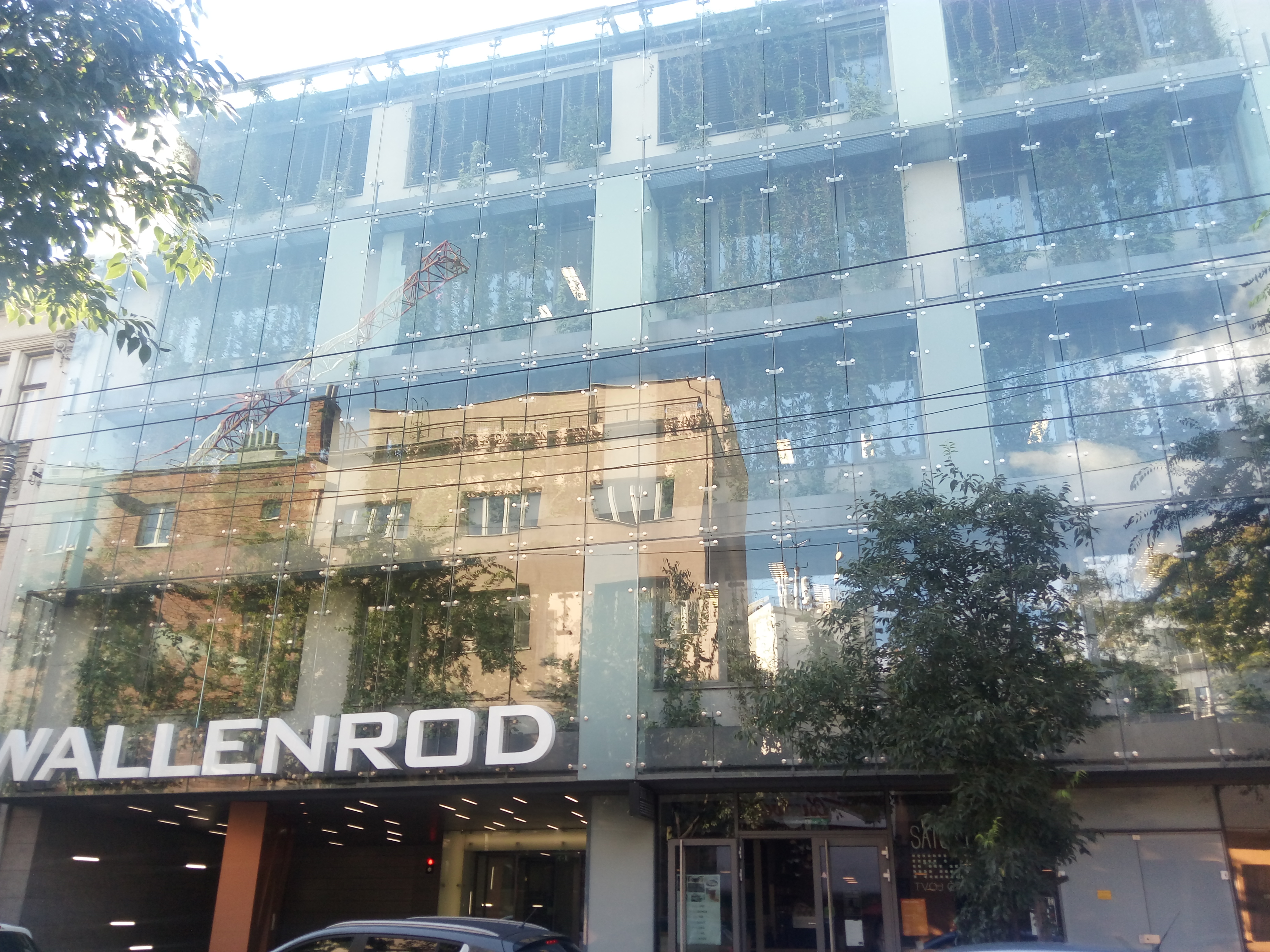 Mickiewiczova 9, Staré Mesto, Bratislava